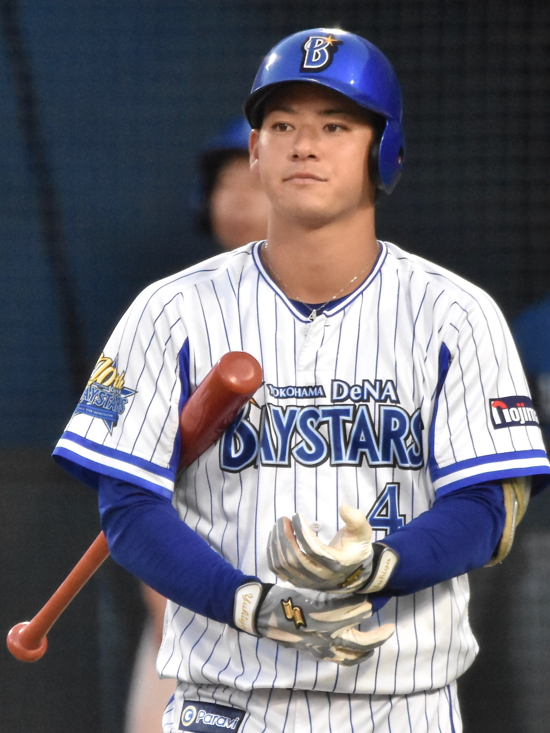 伊藤裕季也（横浜DeNAベイスターズ） 2019年8月17日、横浜スタジアムにて